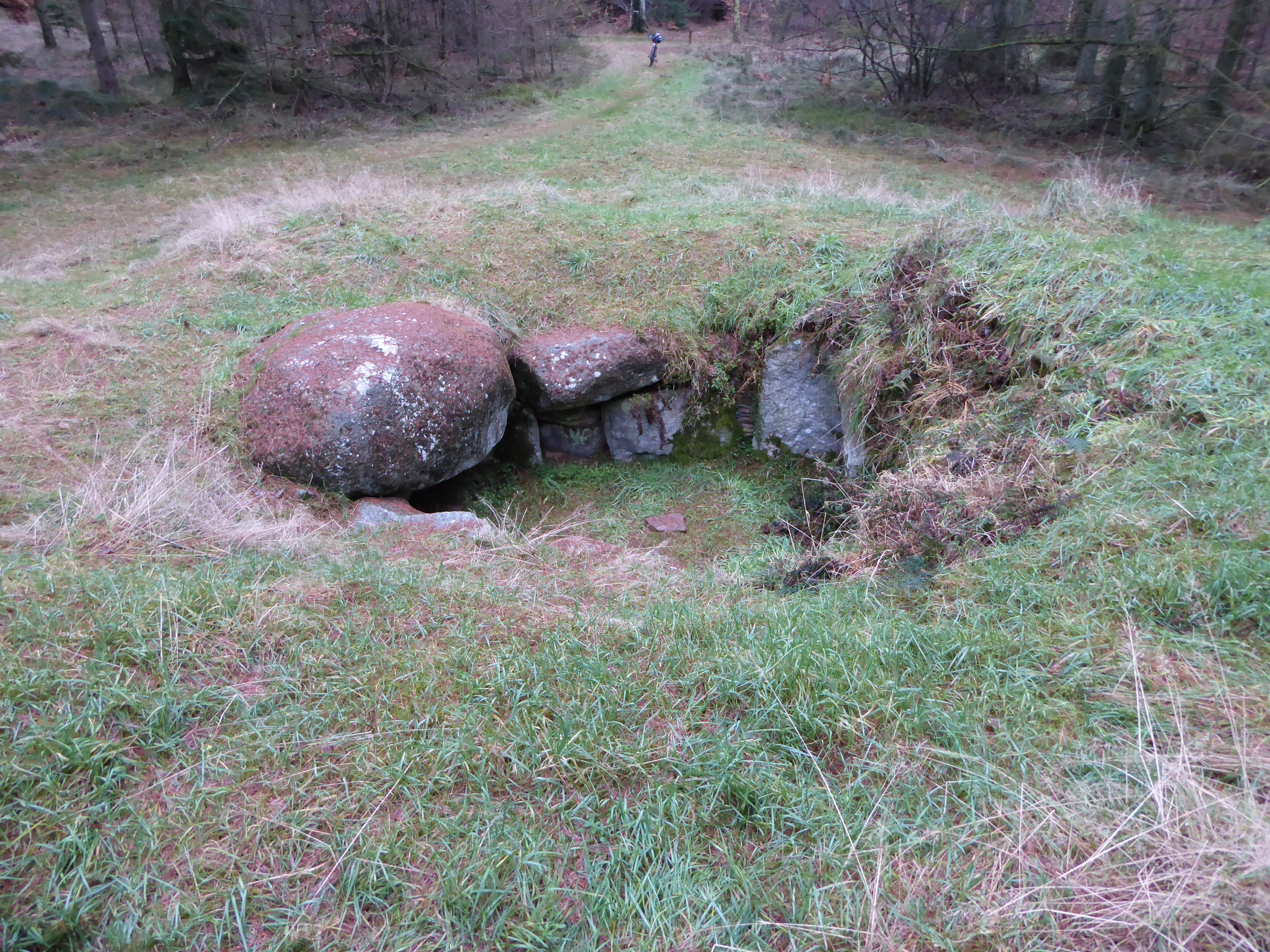 Et kig ned i Røverstuen